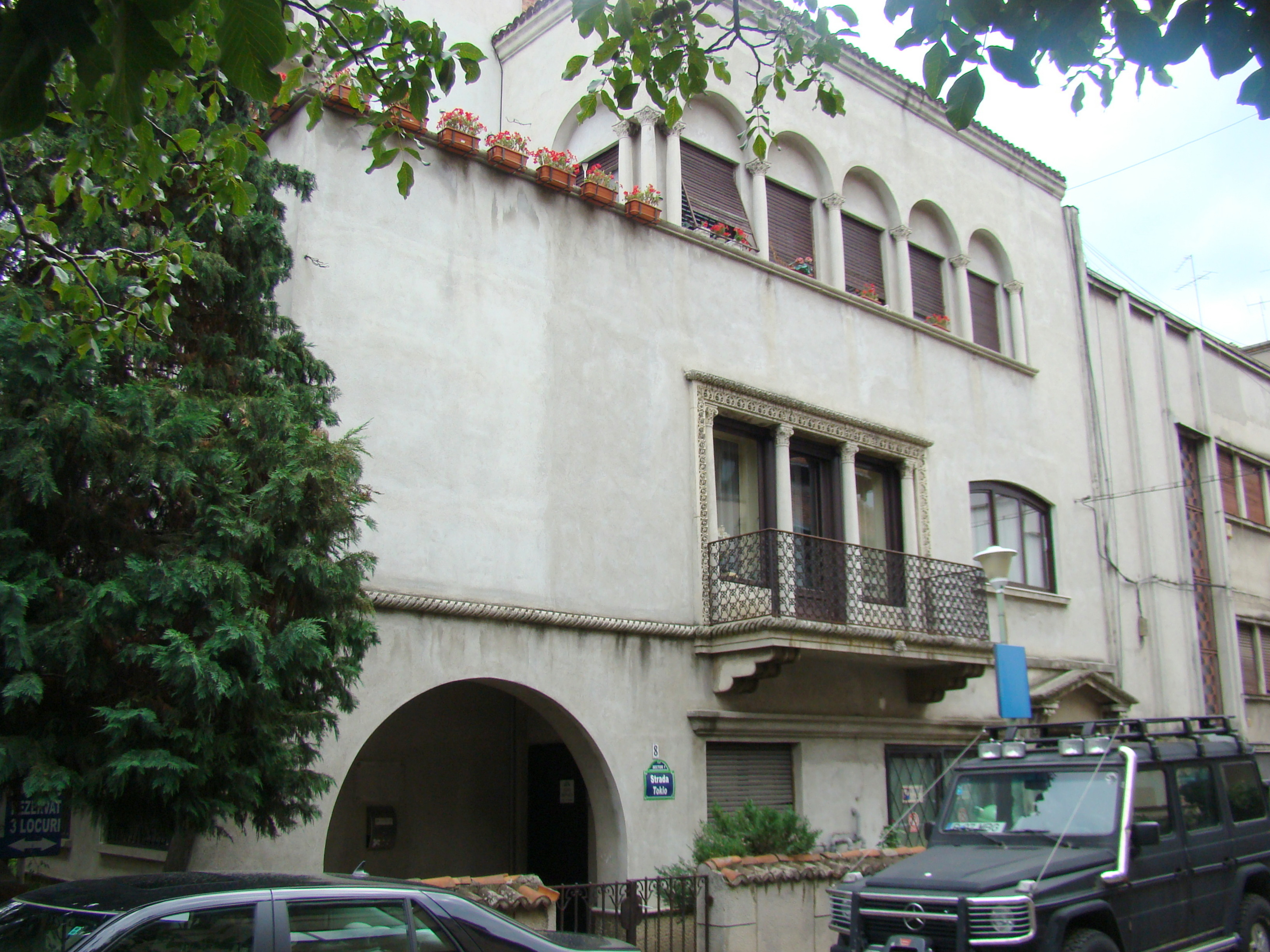 Clădire monument istoric, str. Tokio, nr.8